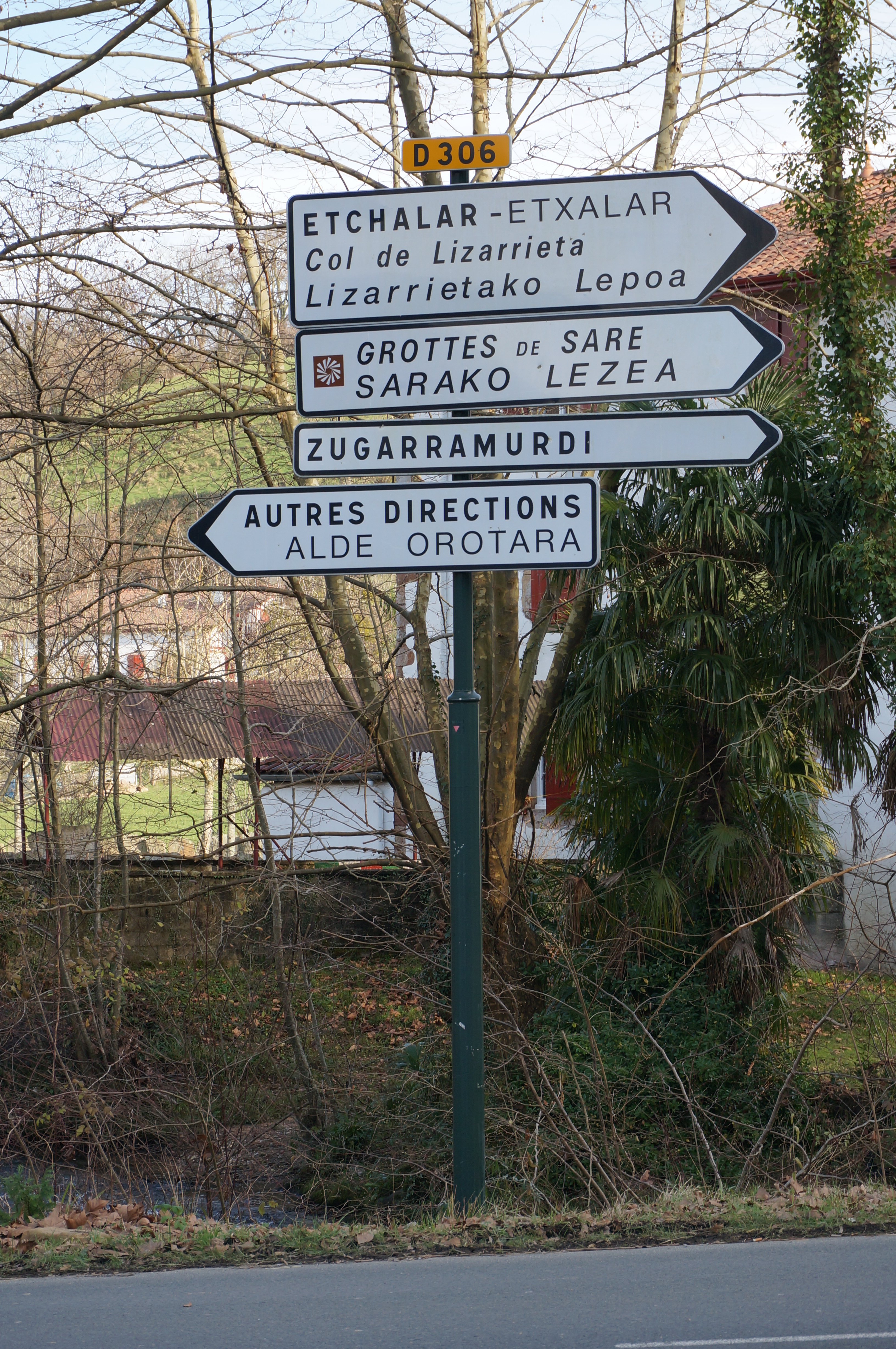 Panneaux bilingues à Sare